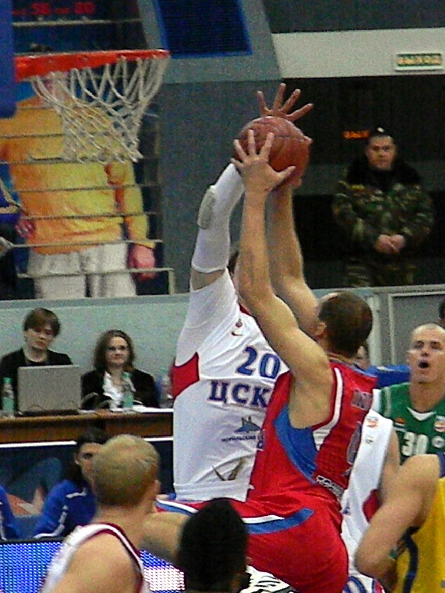 Ramūnas Šiškauskas vs Andrey Vorontsevich at all-star PBL game 2011